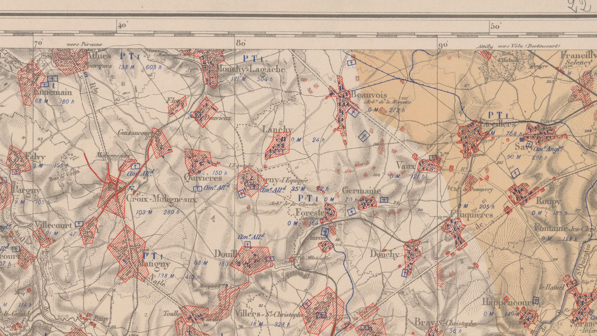 Carte des régions dévastées